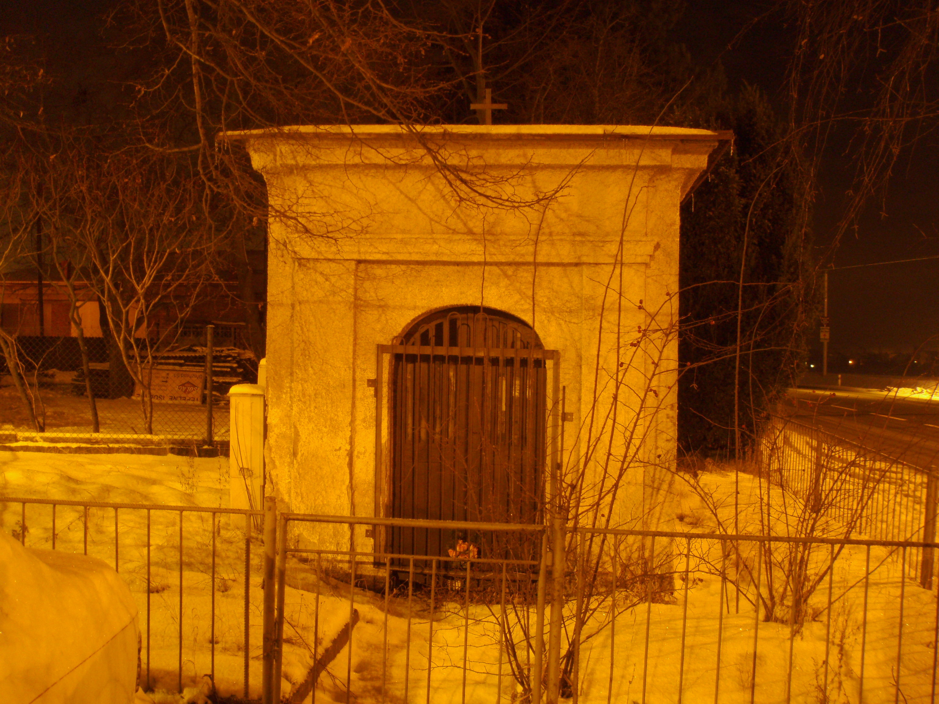 Kaplička na Bláhovce